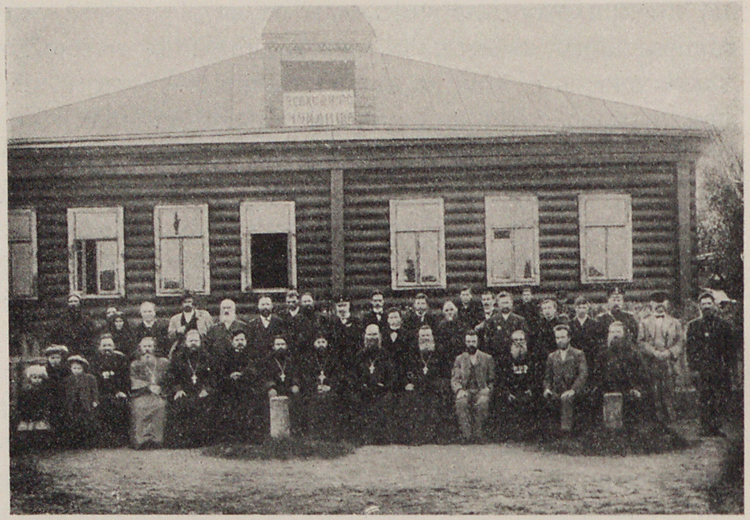 Церковно-приходская школа Всехсвятского